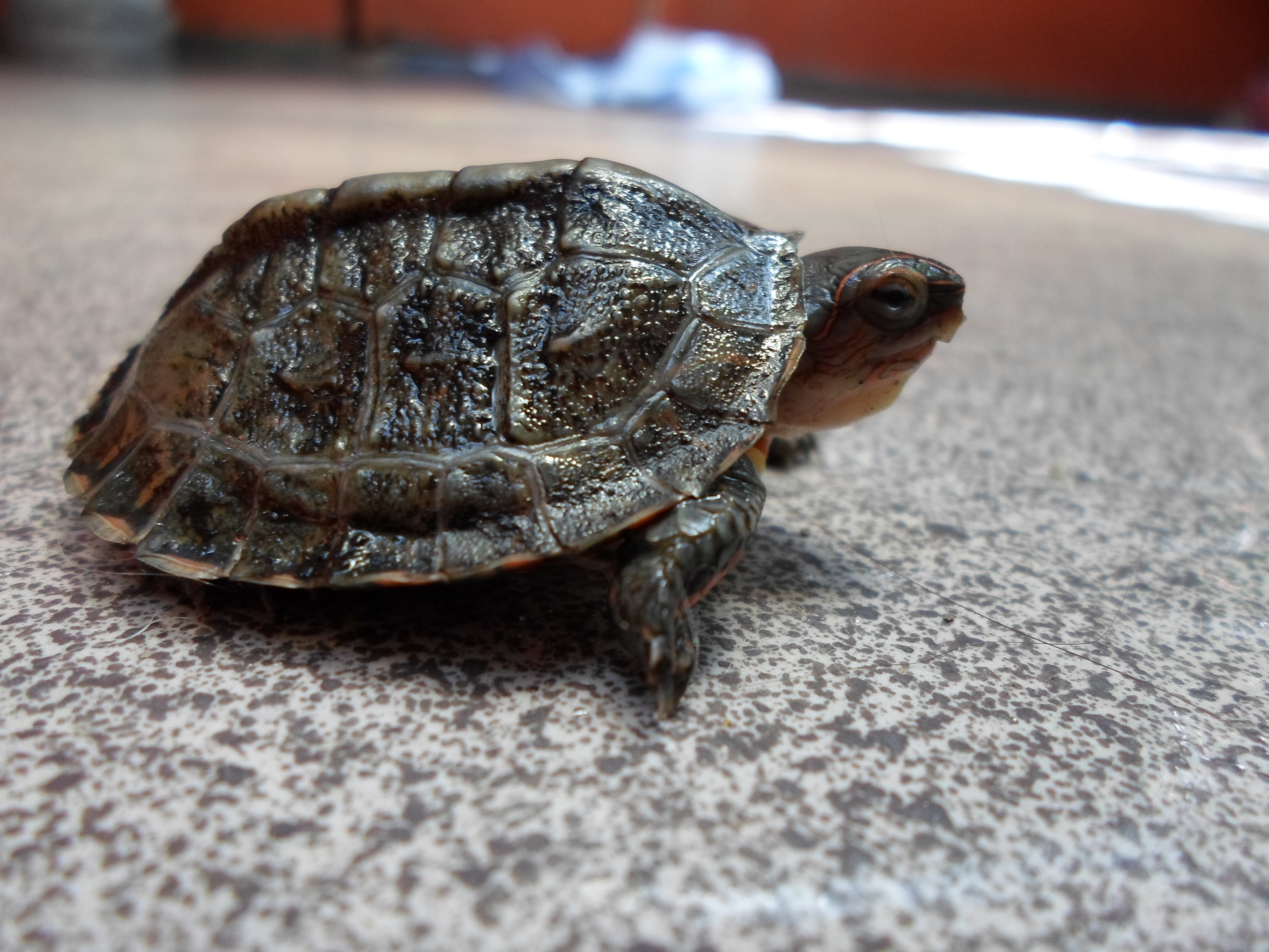 Cría de una tortuga de la especie Rhinoclemmys Pulcherrima